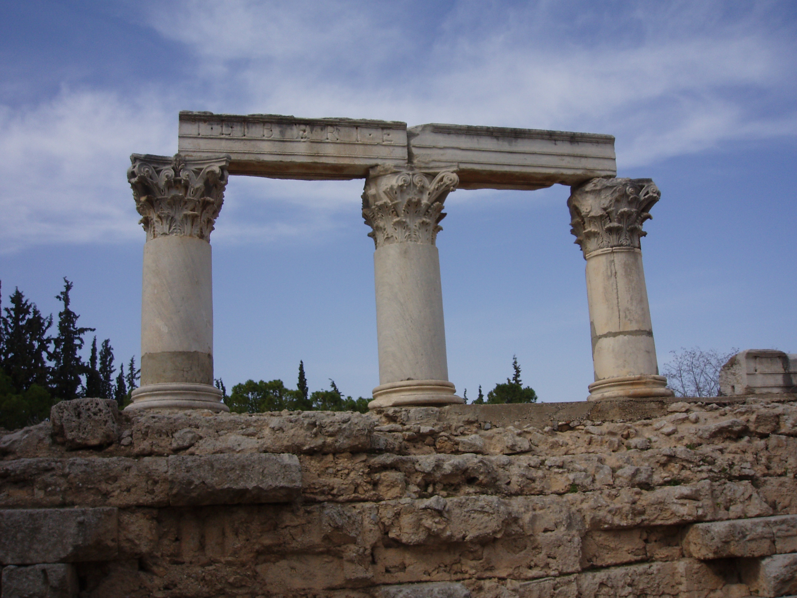 Säulenreste in Korinth